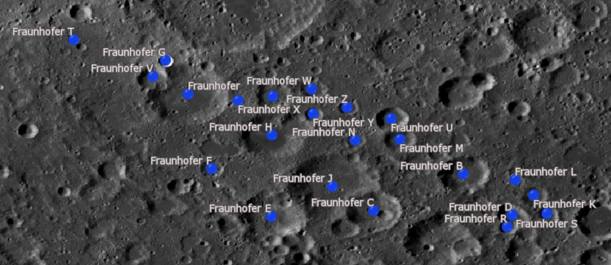 Cráter lunar Fraunhofer. Cráteres satélite. (Imagen LRO)